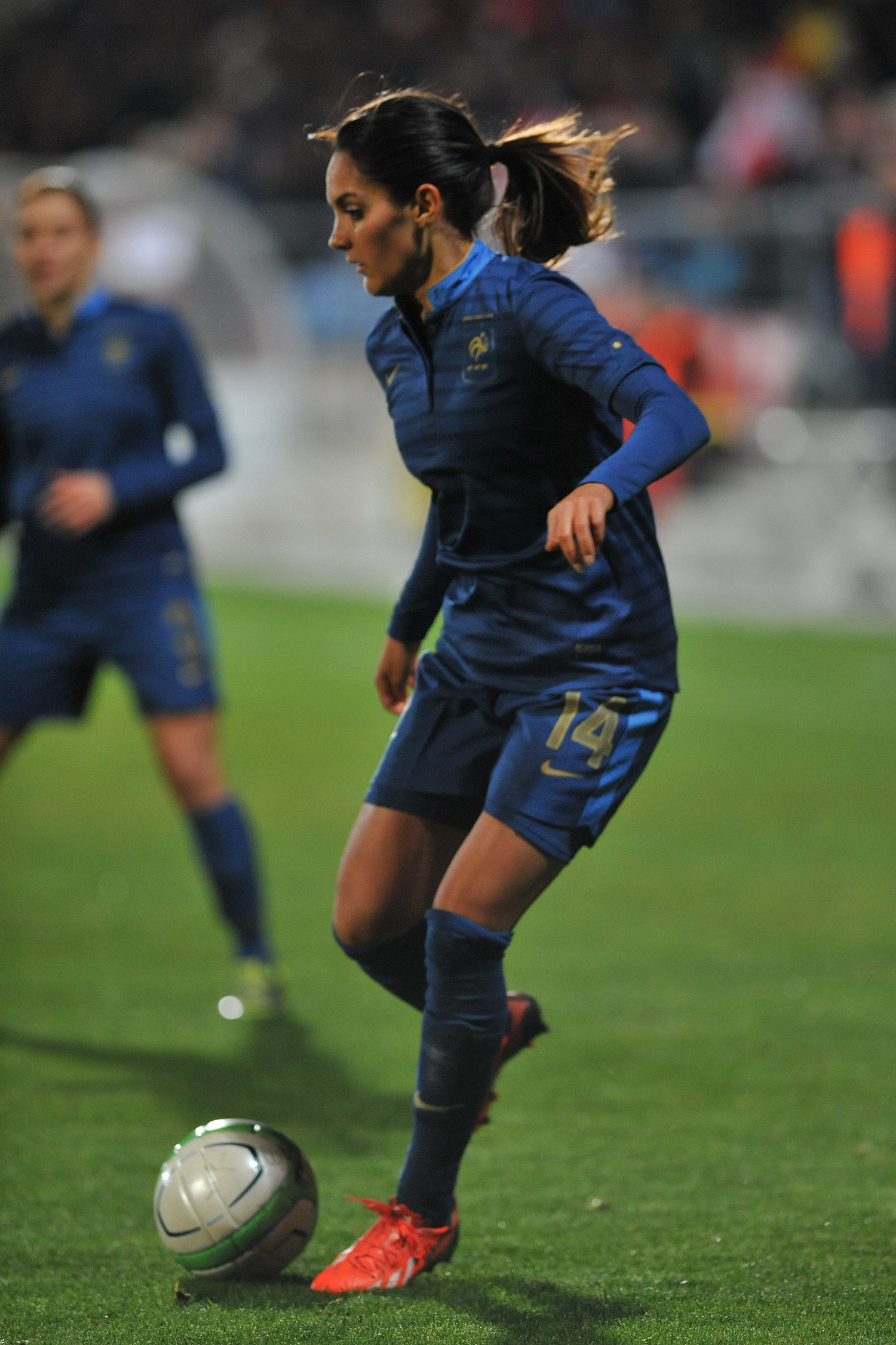 FIFA Women's World Cup 2015 Qualiying Round Österreich - Frankreich am 31. Oktober 2013 in Ritzing: Louisa Necib